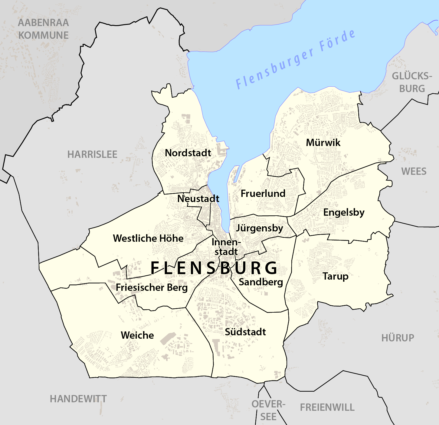 Karte Stadtteile Flensburg